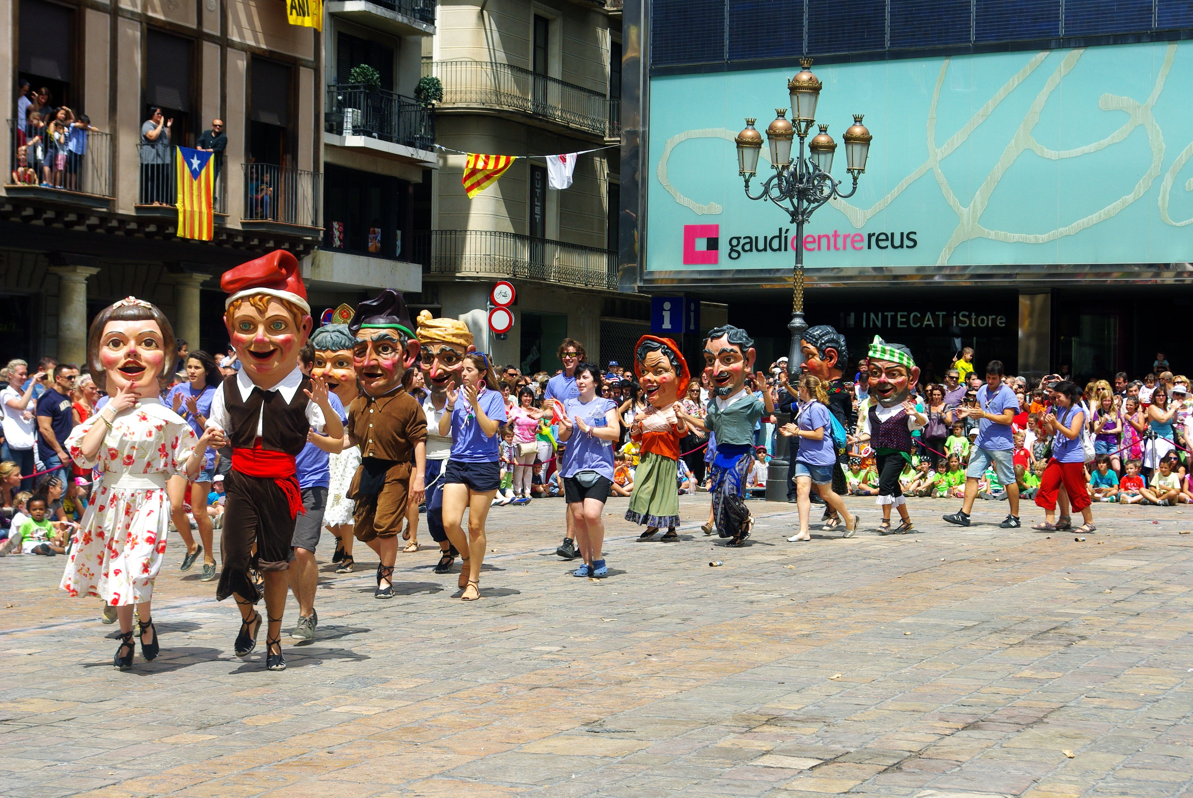 Els Nanos de Reus al Mercadal. Sant Pere 2014